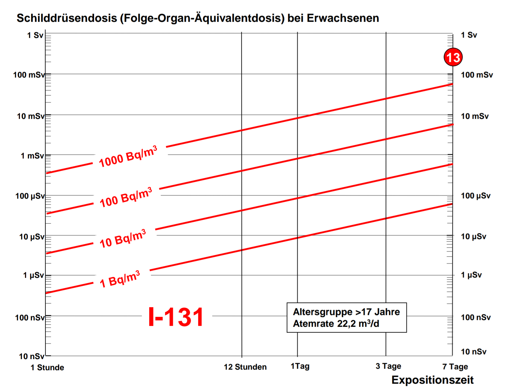 Dosisaufnahme (Schilddrüsendosis) durch Inhalation von elementarem I-131 bei bekannter Aktivitätskonzentration in der Luft